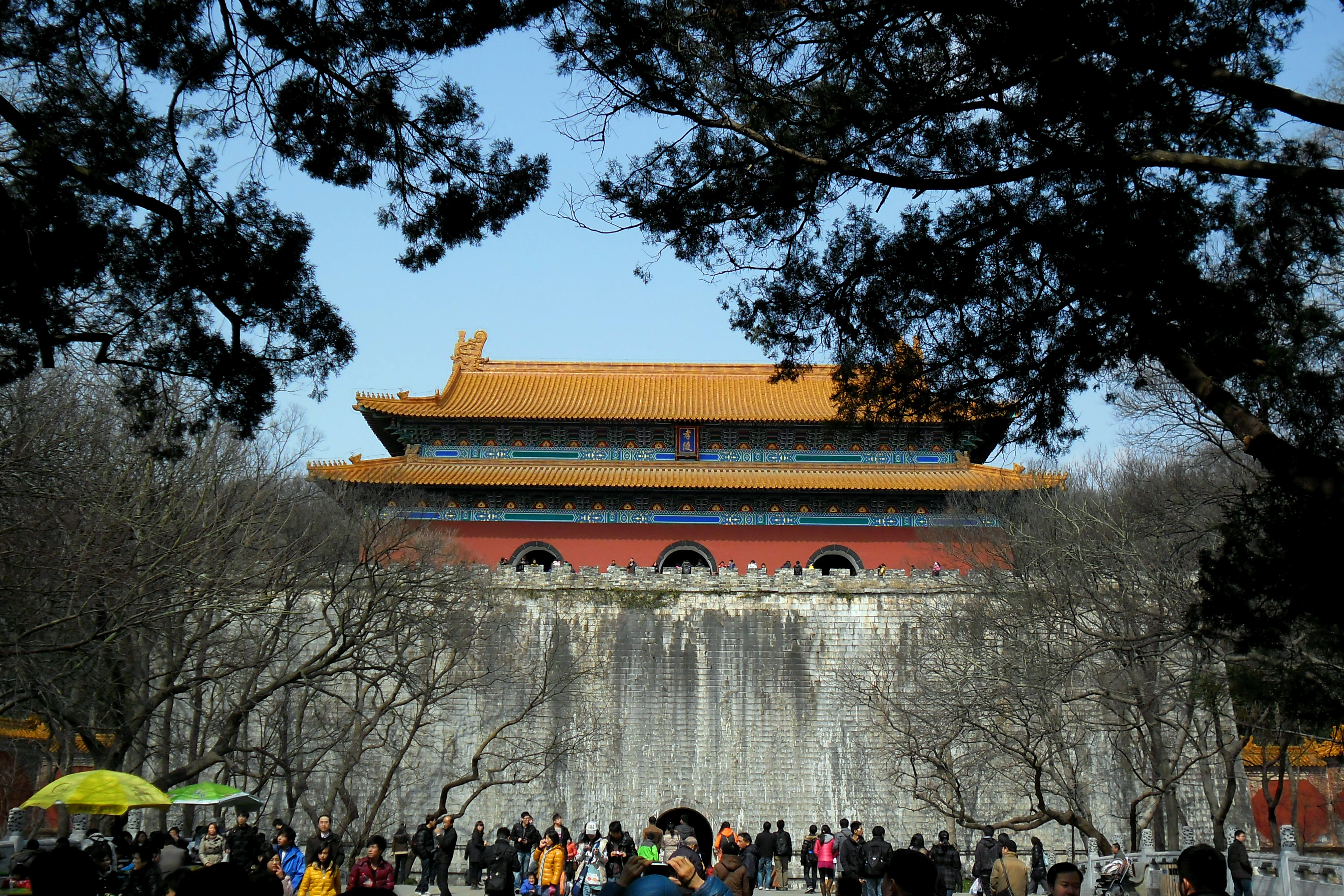 中文（中国大陆）: 江苏省南京市